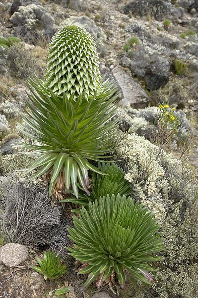 Riesenlobelien auf dem Kilimanjaro, Wachstum bis ca. 4.000m über NN